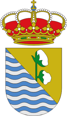 Guadalcacin escudo